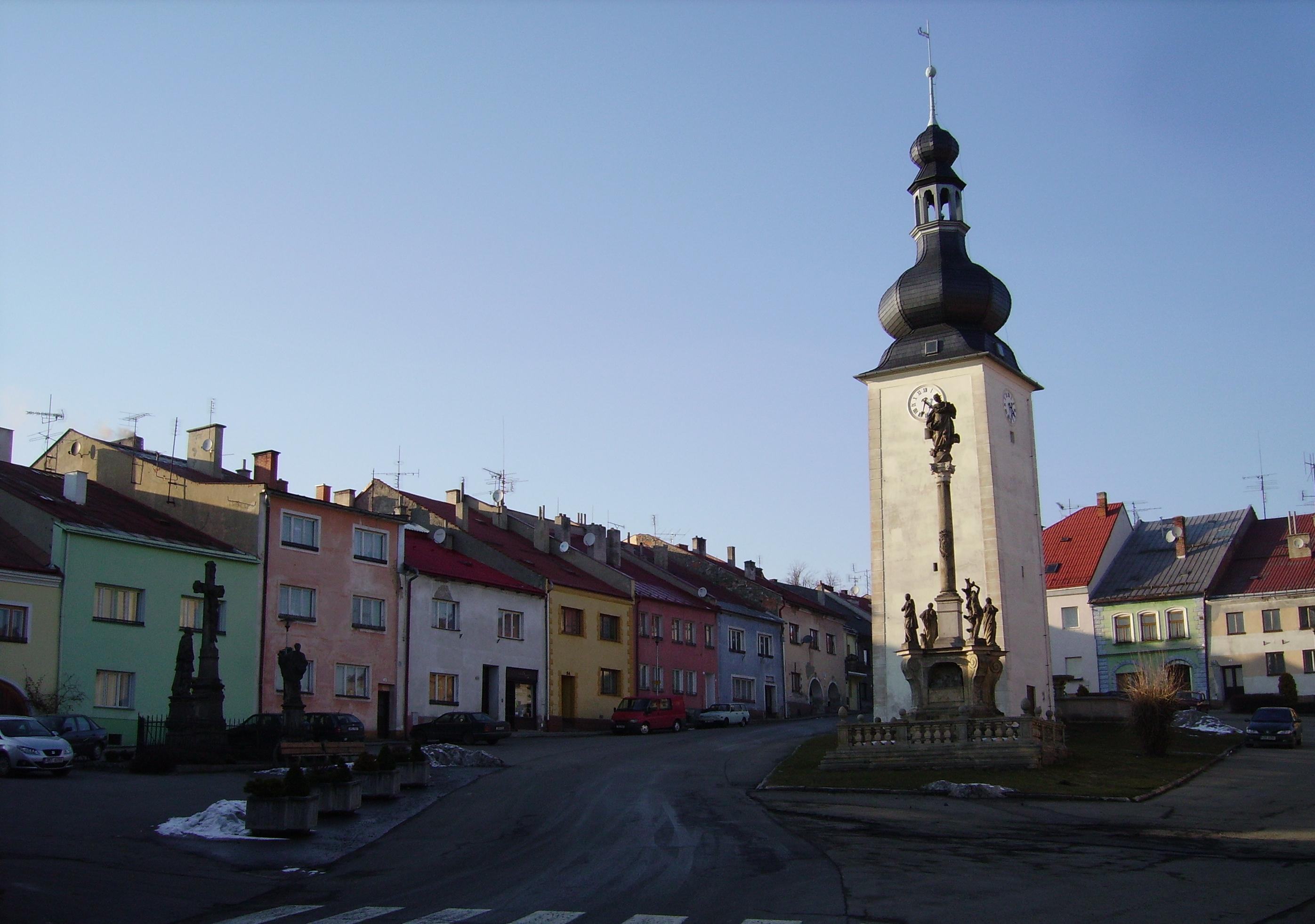 Náměstí v Potštátě